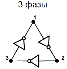 Fig2_ring_oscillator